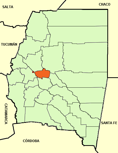 Mapa editado de: Santiago del Estero province (Argentina), departments and capital.png